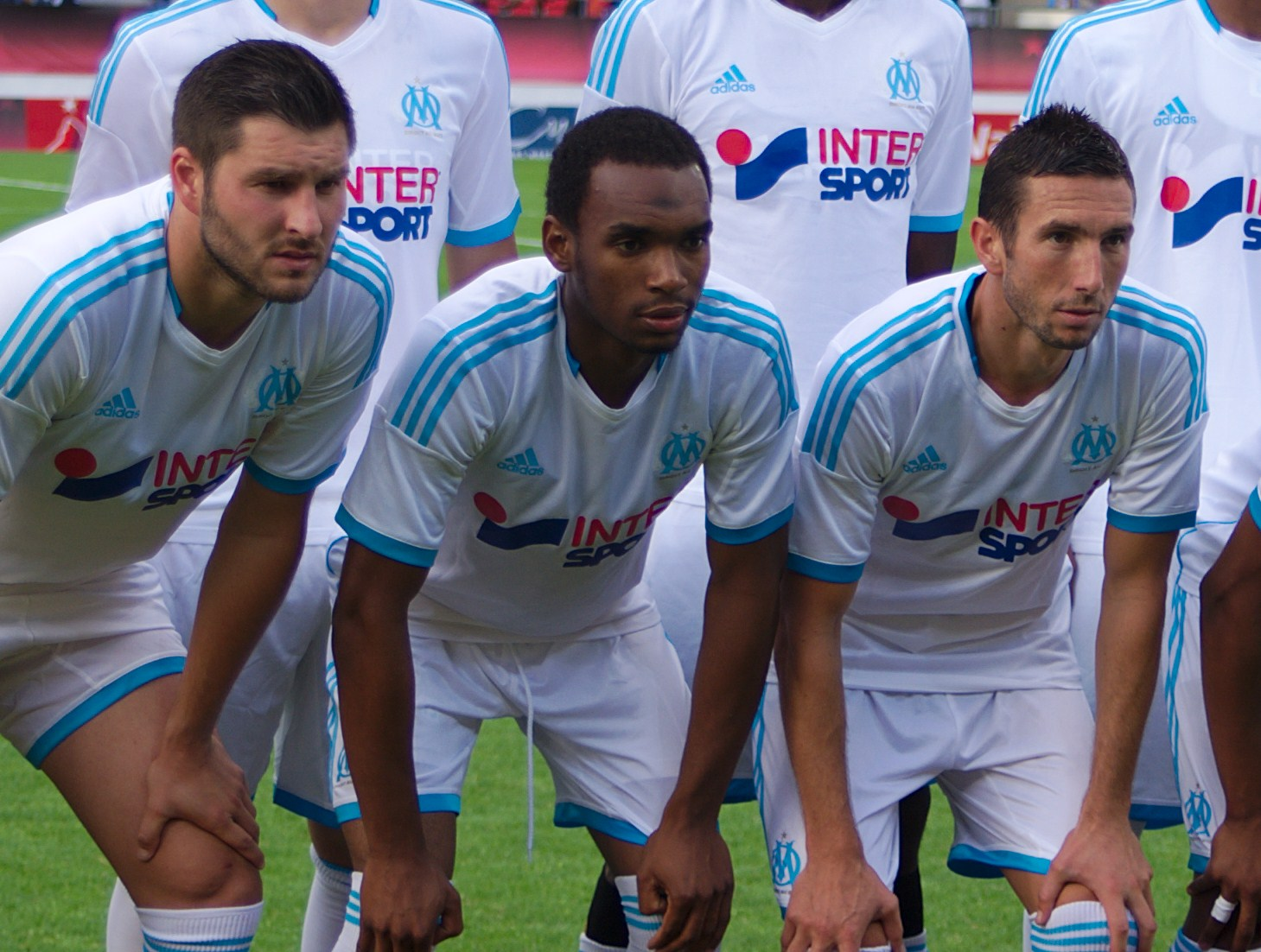 André-Pierre Gignac, Rafidine Abdullah et Morgan Amalfitano